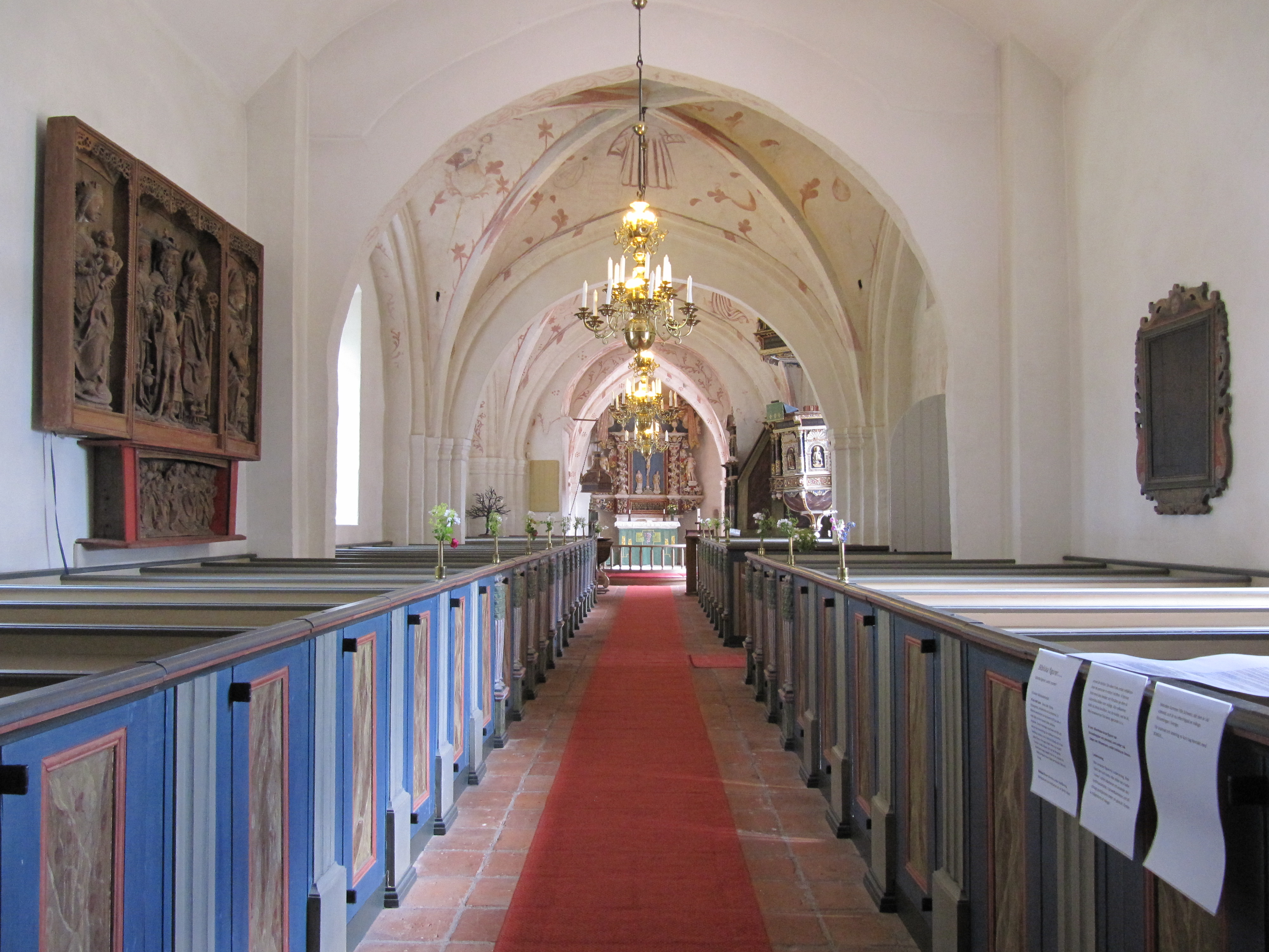 Kyrkorum i Gualövs kyrka